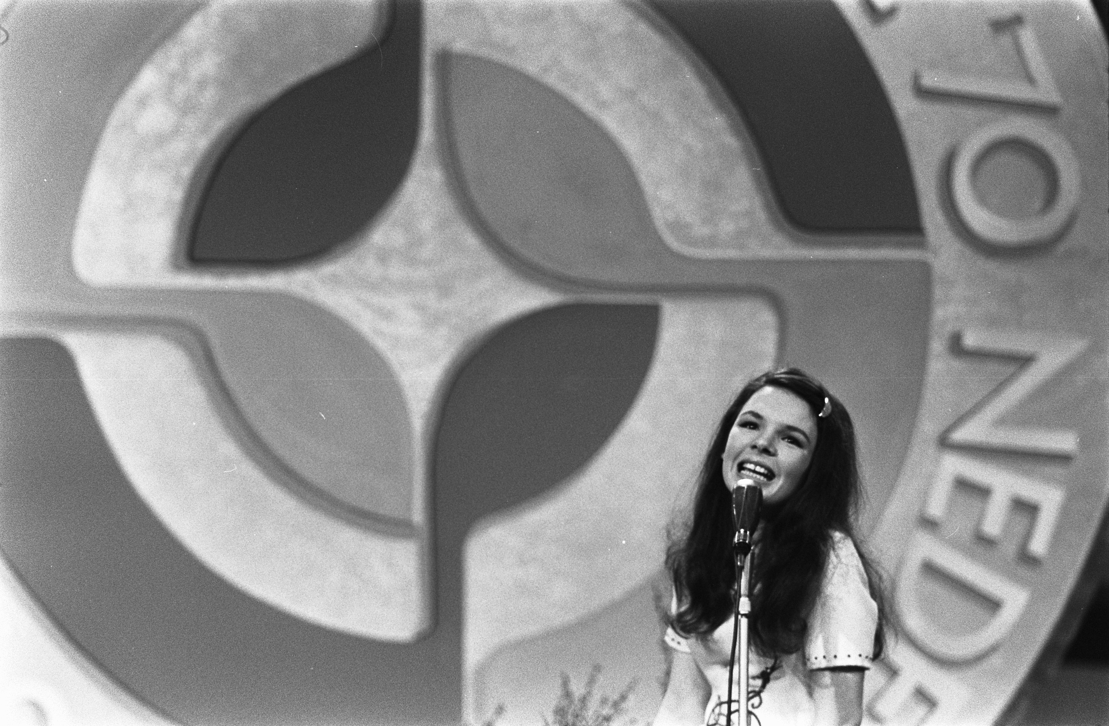 Collectie / Archief : Fotocollectie Anefo Reportage / Serie : Eurovisie Songfestival 1970 in RAI te Amsterdam Beschrijving : Winnares Dana (Ierland) Datum : 21 maart 1970 Locatie : Amsterdam, Noord-Holland Trefwoorden : artiesten, songfestivals, zangers Persoonsnaam : Dana Instellingsnaam : Eurovisie Song Festival Fotograaf : Koch, Eric / Anefo Auteursrechthebbende : Nationaal Archief Materiaalsoort : Negatief (zwart/wit) Nummer archiefinventaris : bekijk toegang 2.24.01.05 Bestanddeelnummer : 923-3702